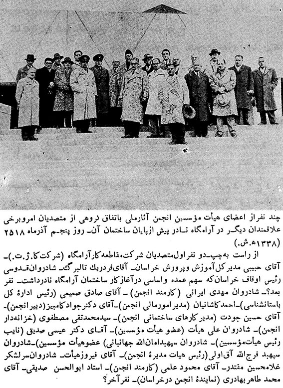 چند نفر از اعضای هیئت موسسین انجمن آثار ملی در آرامگاه نادر مورخ پنجم آذرماه 1338 خورشیدی